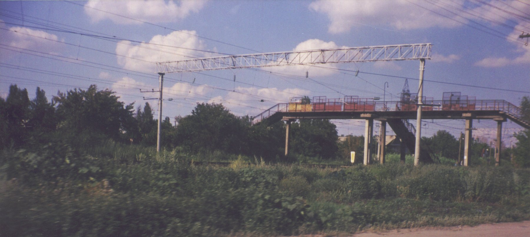 Fervoja supertraka kontakta linio apud Volgograd, Rusio, 2003. Videblas solivo, kuŝanta sur du fostoj. Sub la solivo pendas la kontakta linio. Dekstre videblas piedira ponto tra la trakoj. Mi, aŭtoro de la bildo, permesas al ĉiuj uzi ĝin kun ĉi tiuj kondiĉoj: La fonta bildo de ĉi tiu bildo estas ankaŭ en mia propra retpaĝaro [1]